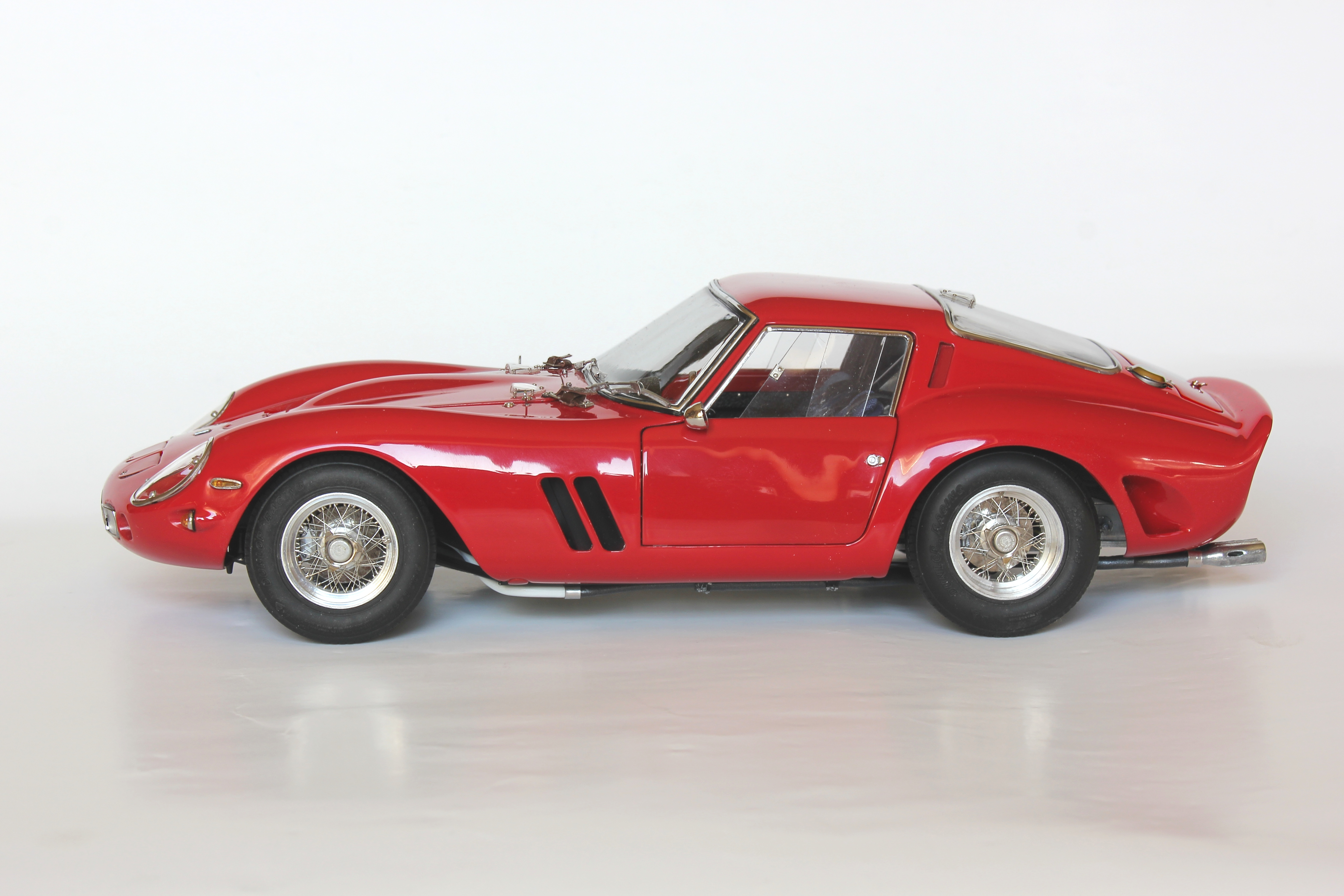 Modell eines Ferrari 250 GTO, Baujahr 1962, von CMC